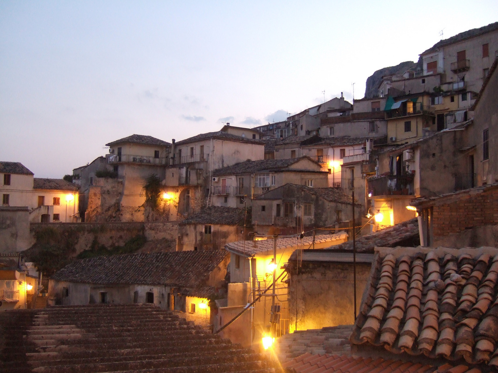 Stilo Vecchio